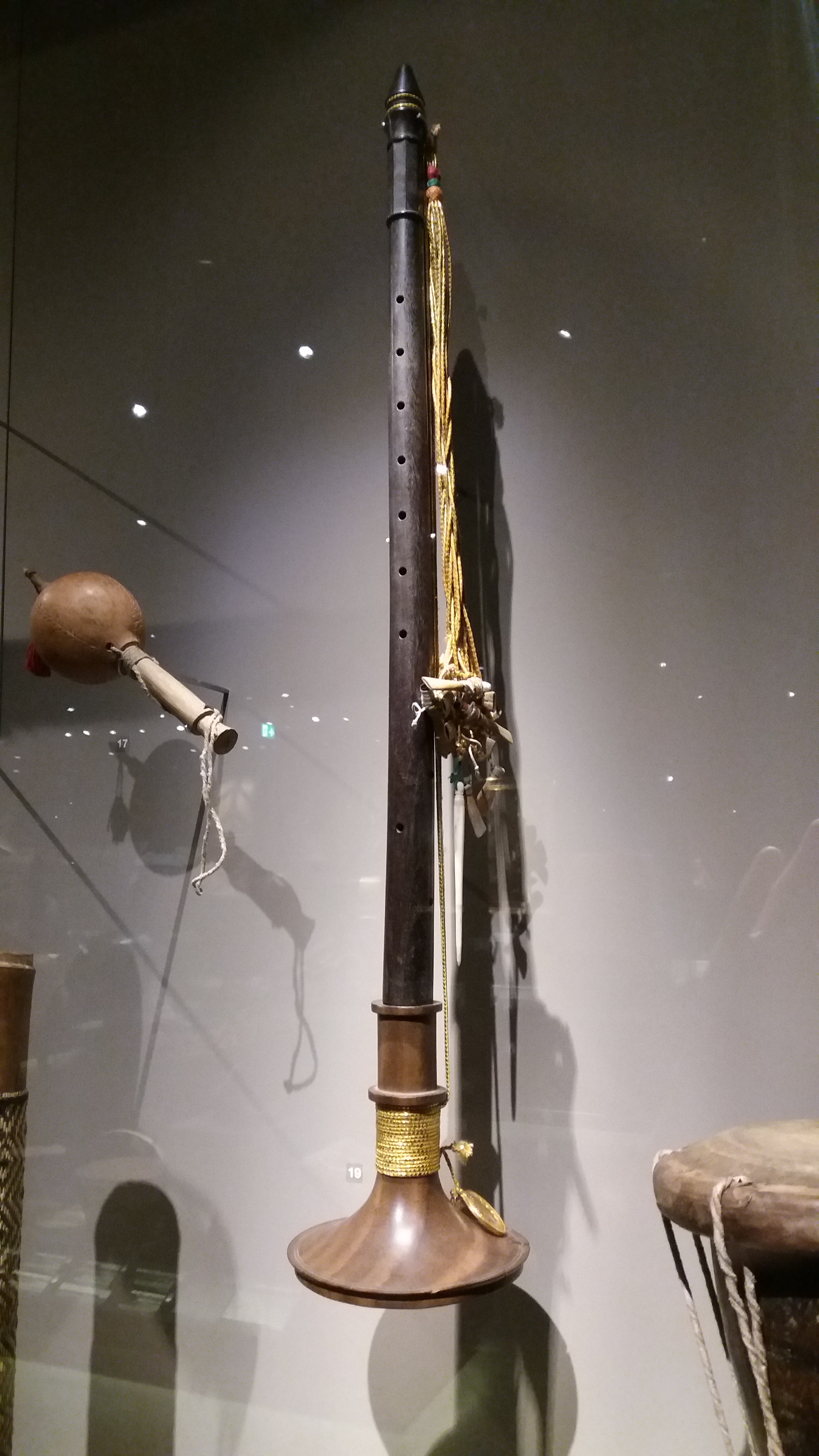 Nagasvaram ou Nadasvaram (hautbois), en bois, roseau, os et coton, Inde/Kerala/Thrissur (fin du XXe siècle). Numéro d'inventaire : ETHMU 053857.